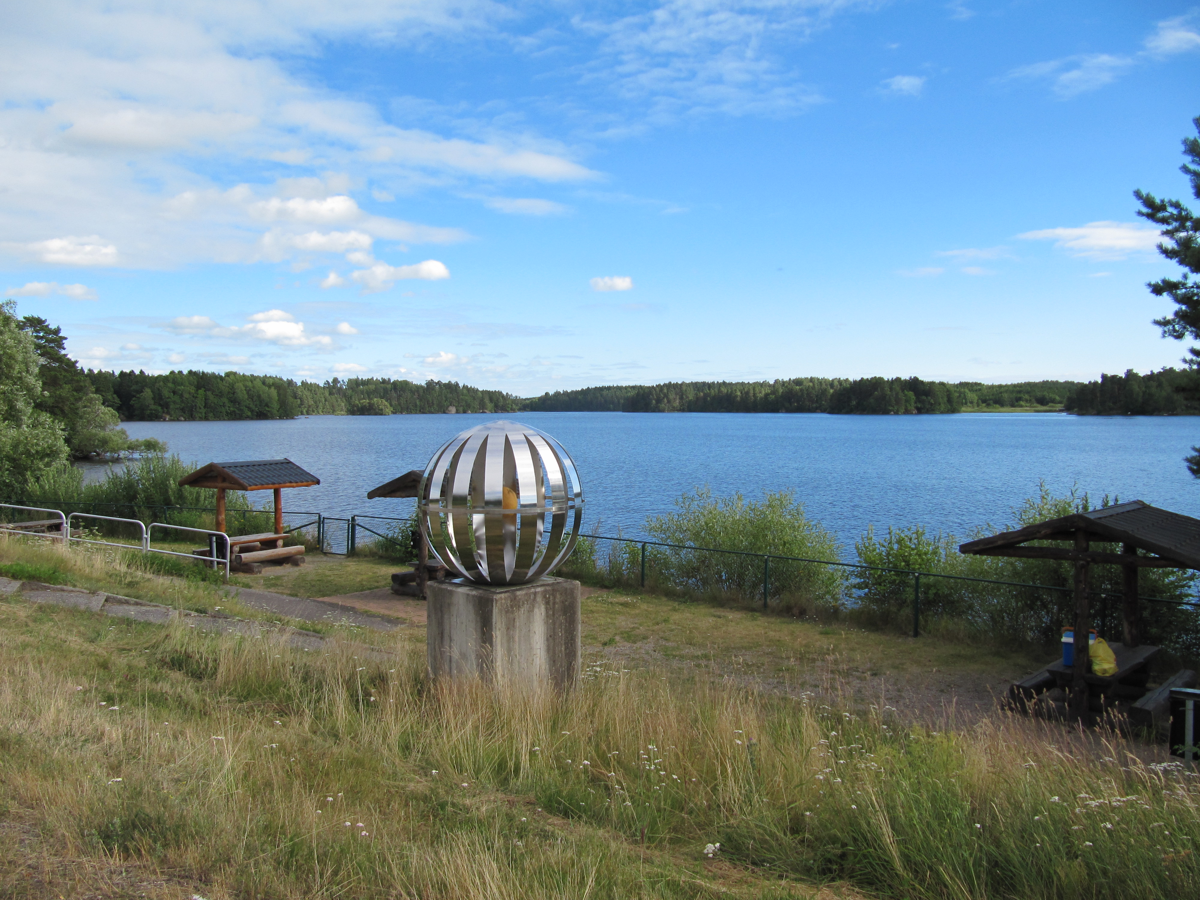 Bild på södra delen av Valdemaren tagen från raststället Stenhammars skans vid den kombinerade Riksväg 55 och Riksväg 57.